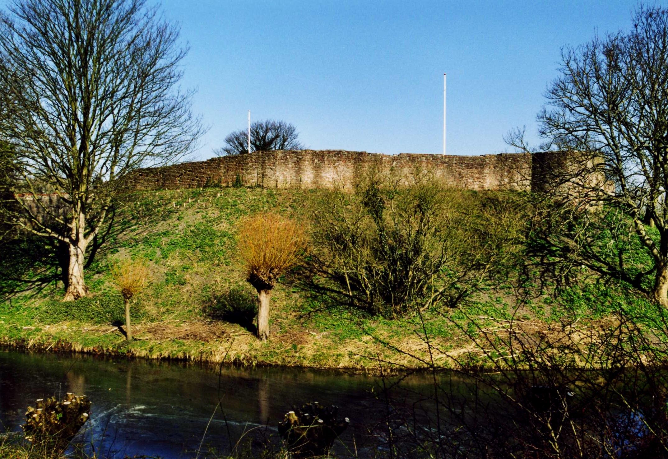 De burcht Oostvoorne.